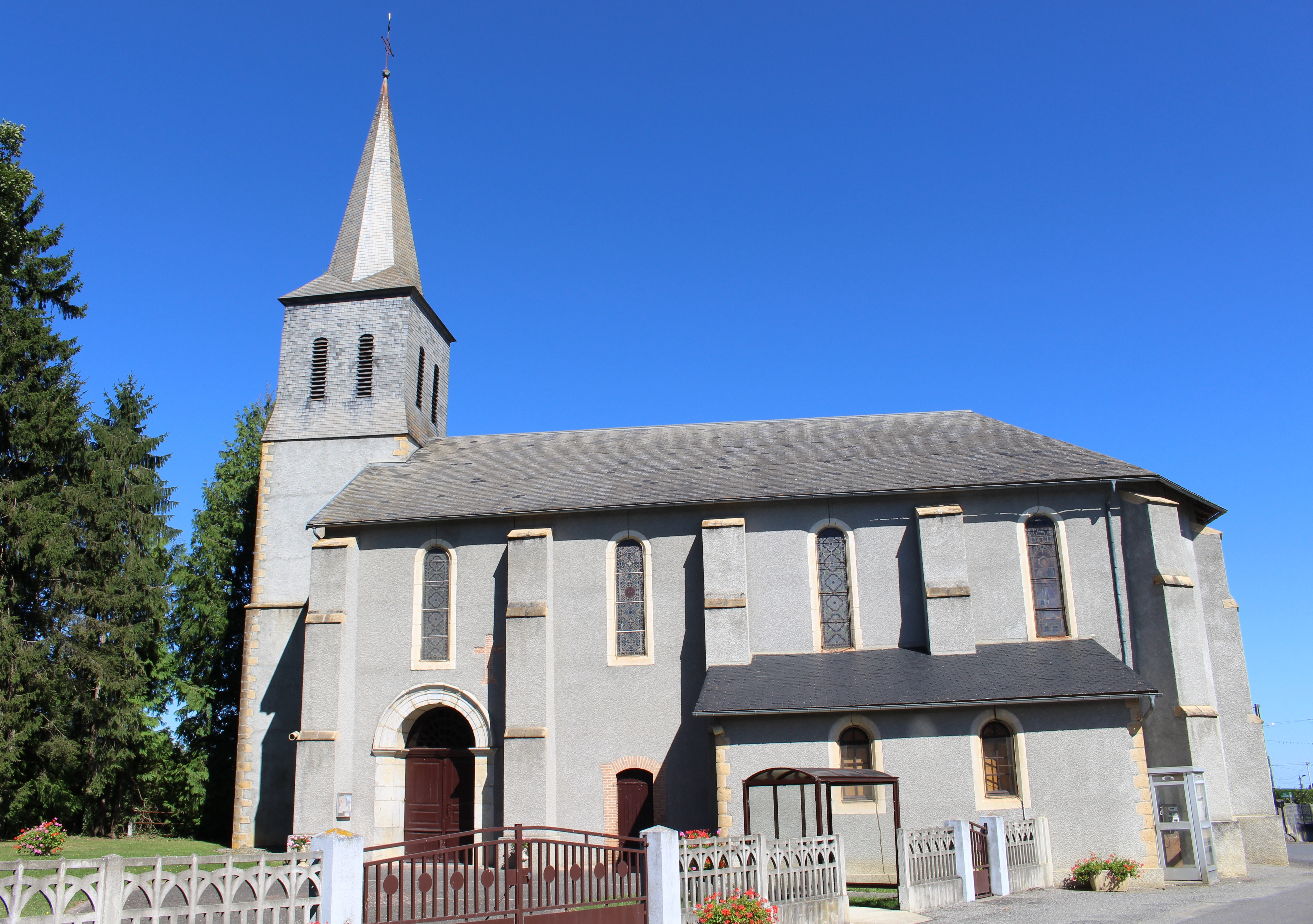 Église Saint-Martin de Recurt (Hautes-Pyrénées)